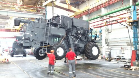 Ростсельмаш. Фото с экскурсии. Фото сделано на камеру мобильного телефона.